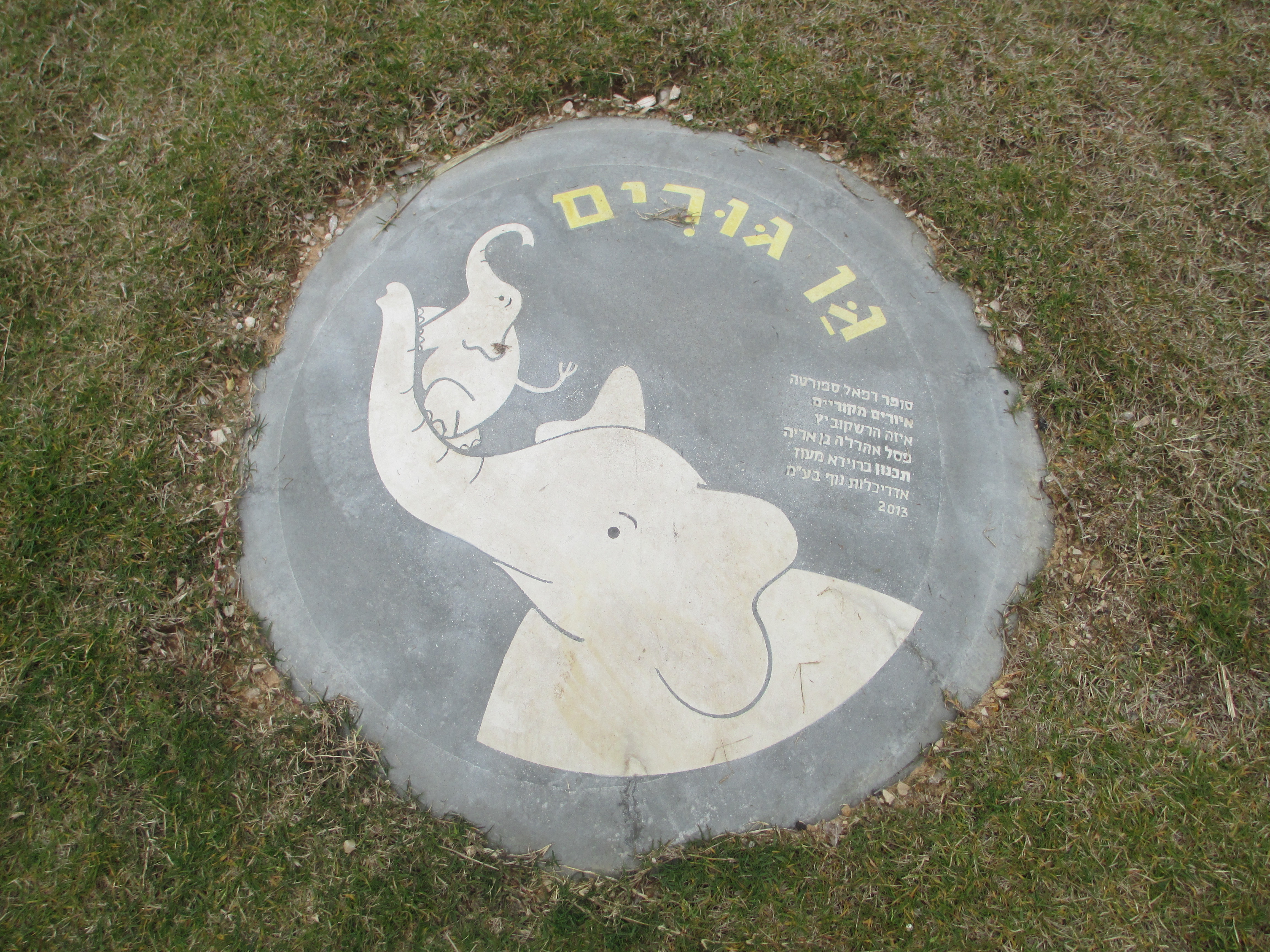 גן גורים בחולון